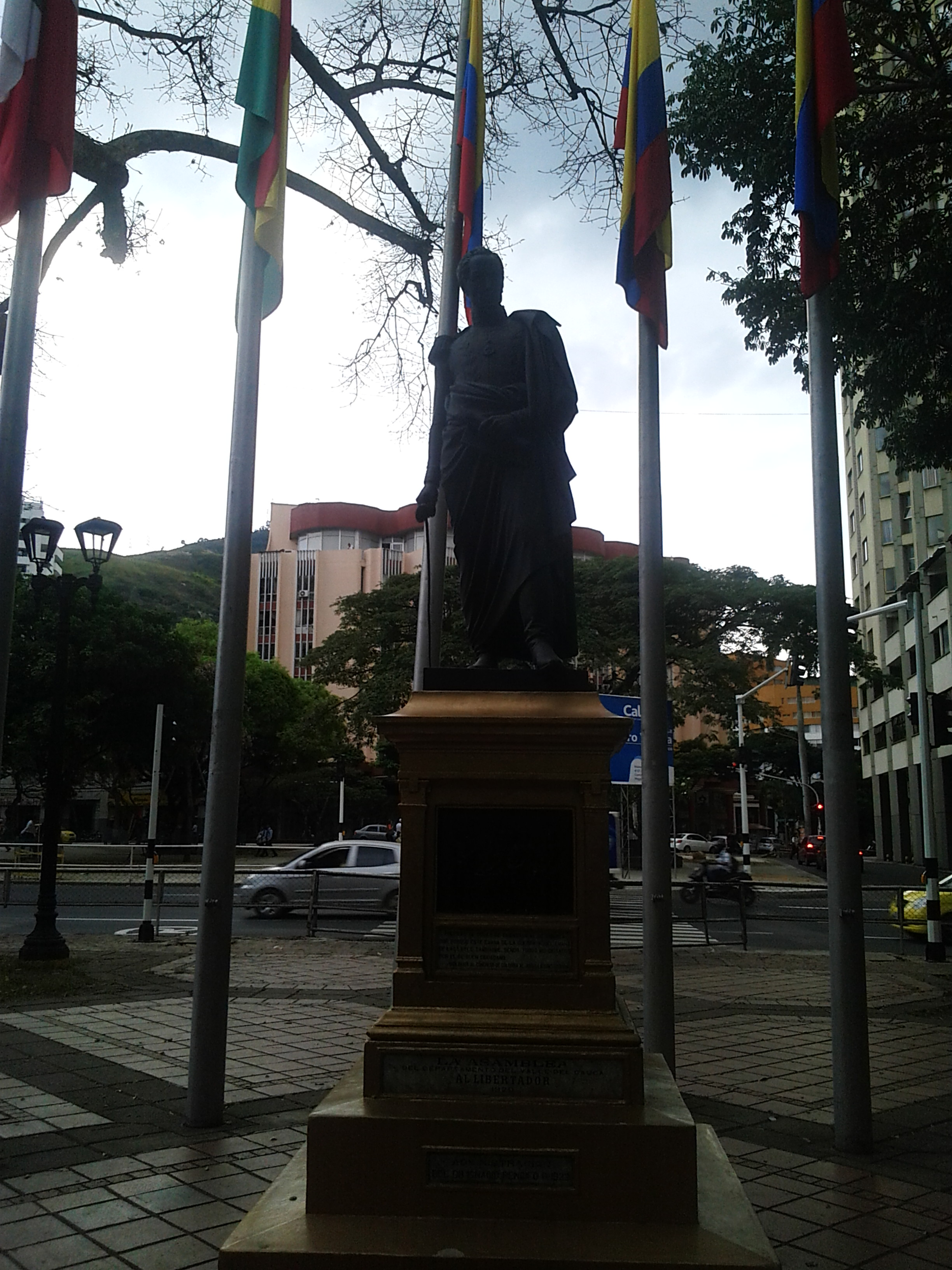 Monumento a Bolívar, Cali.